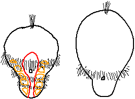 Fases larvarias de Equiuroideo. Dibujo propio